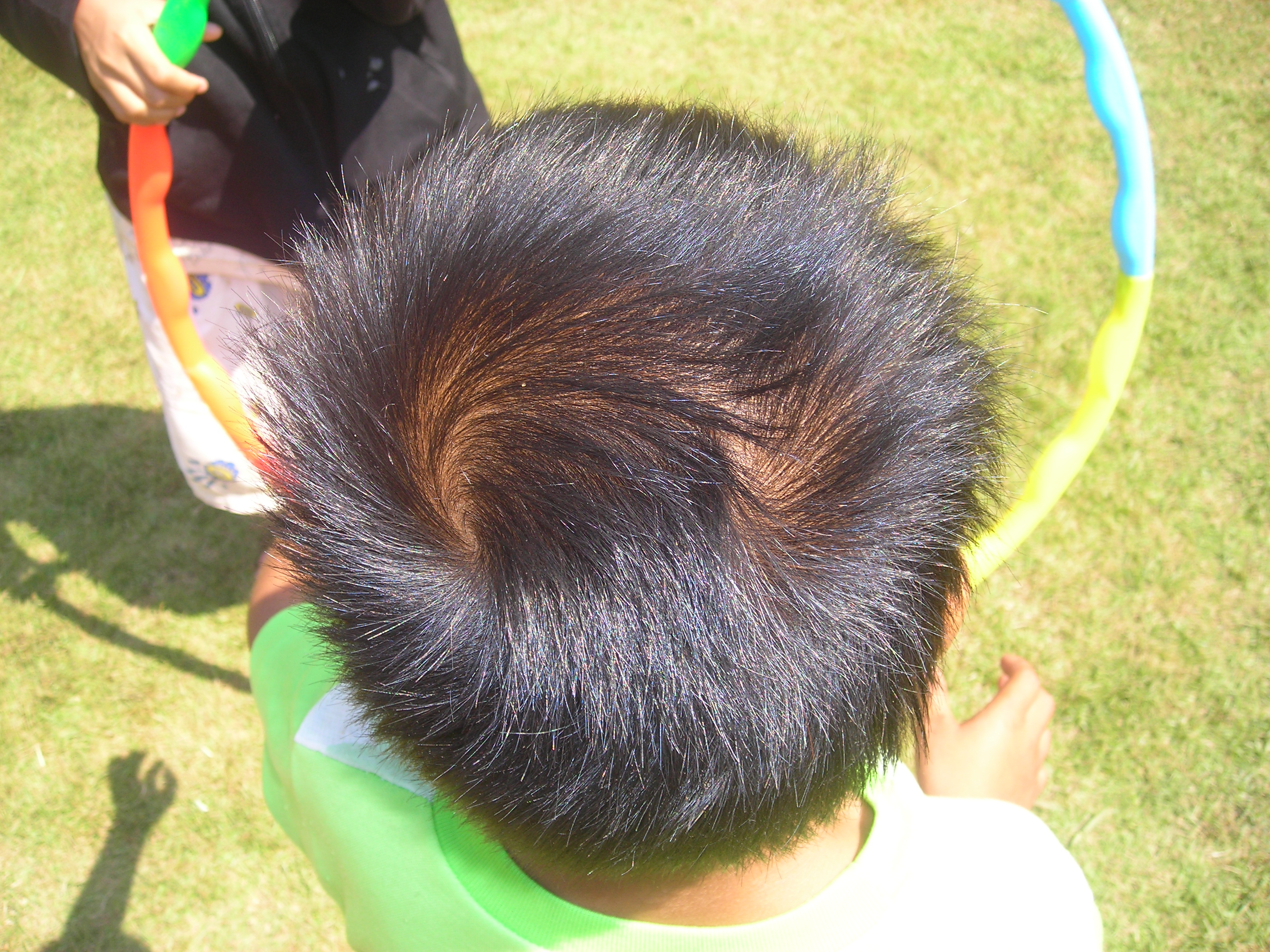 Doppelte Haarwirbel am Hinterkopf eines Jungen.